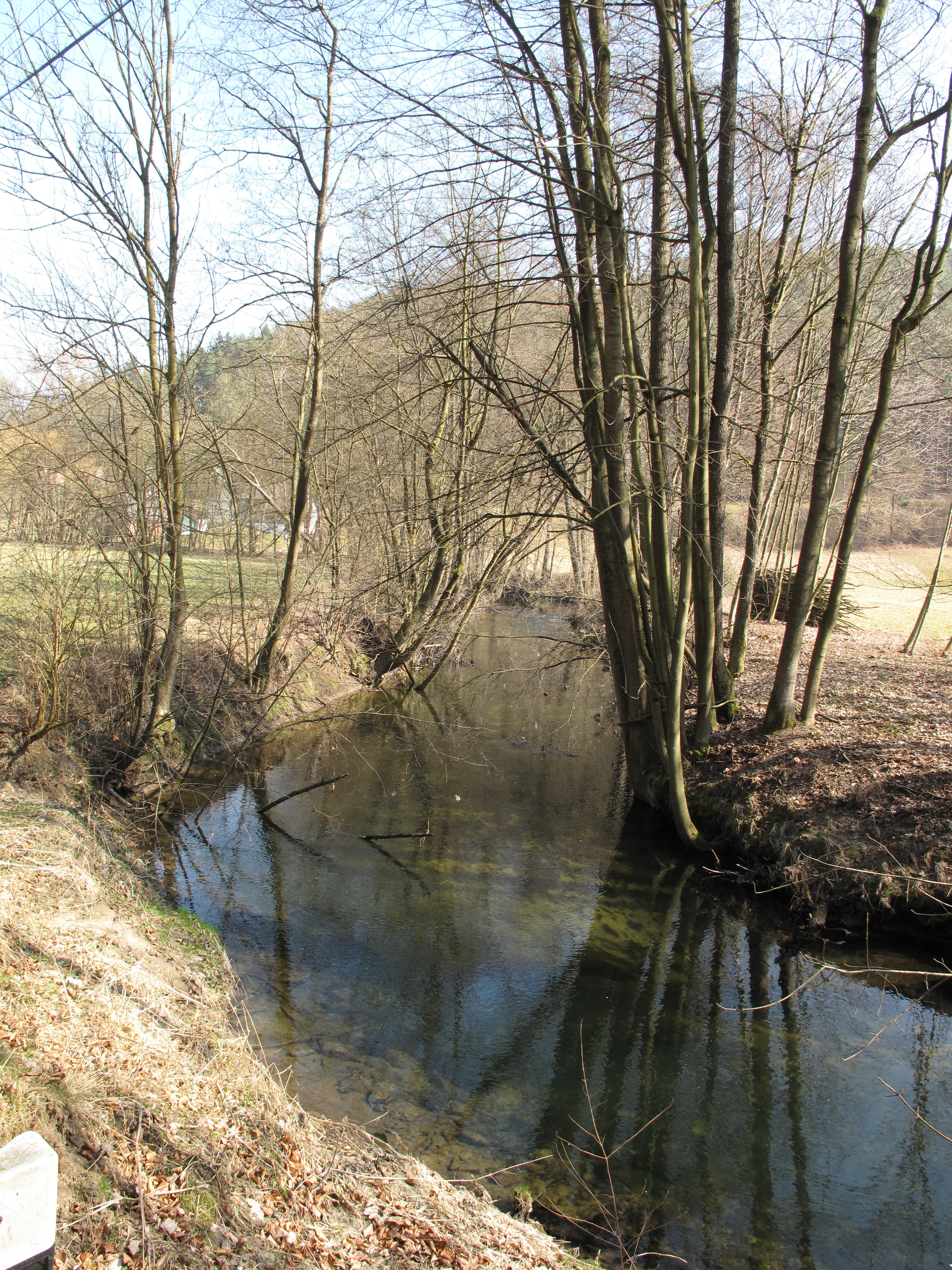 Mohelka v Buřínsku. Okres Mladá Boleslav, Česká republika.